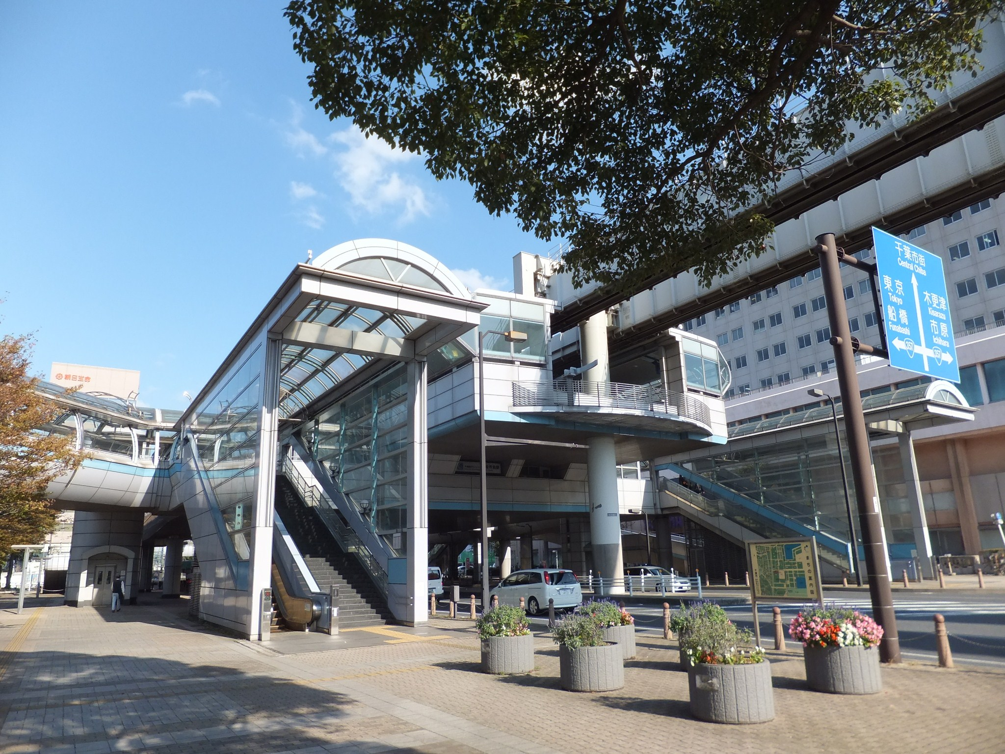 千葉都市モノレール市役所前駅